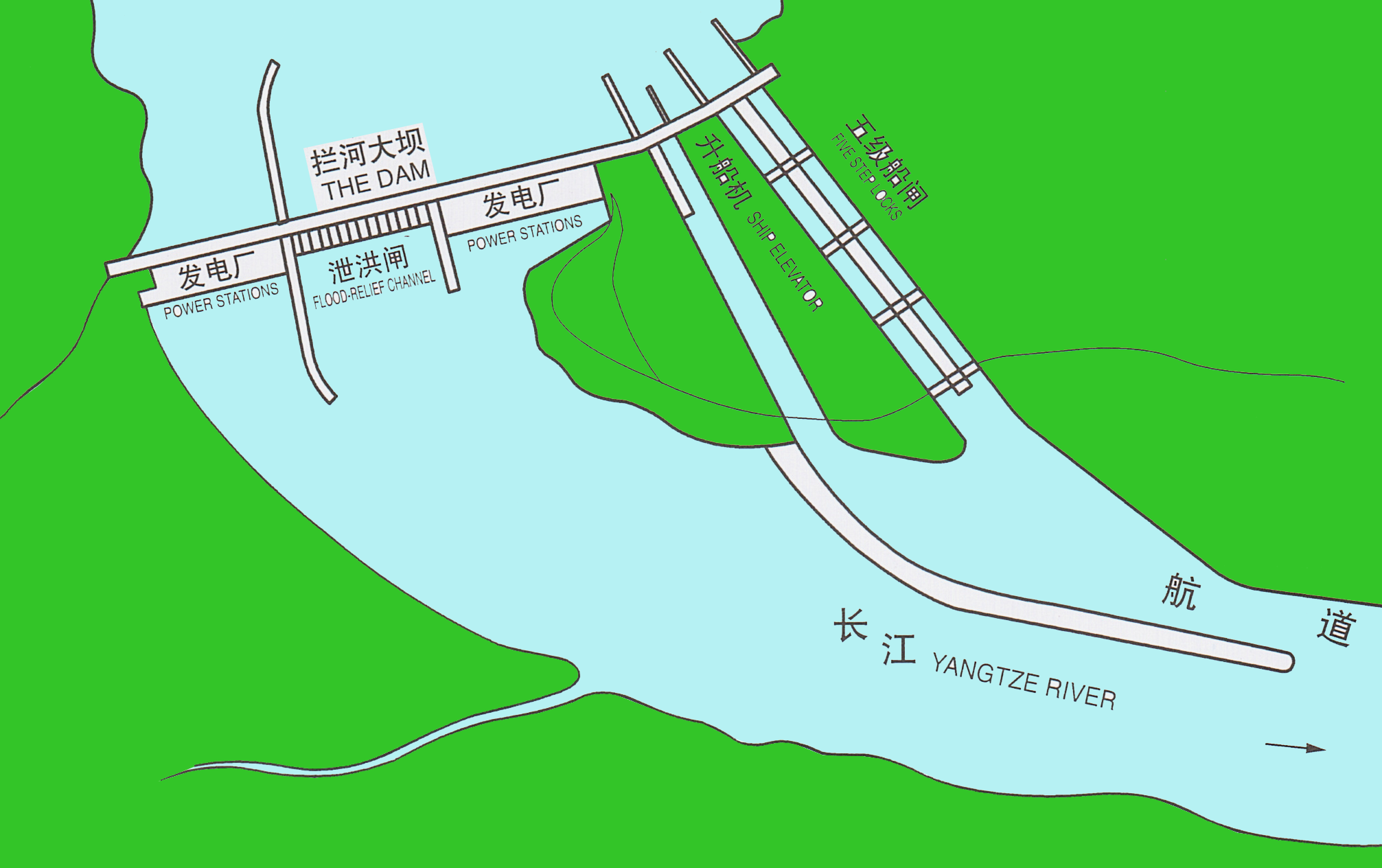 Schéma du barrage des Trois Gorges (Chine)